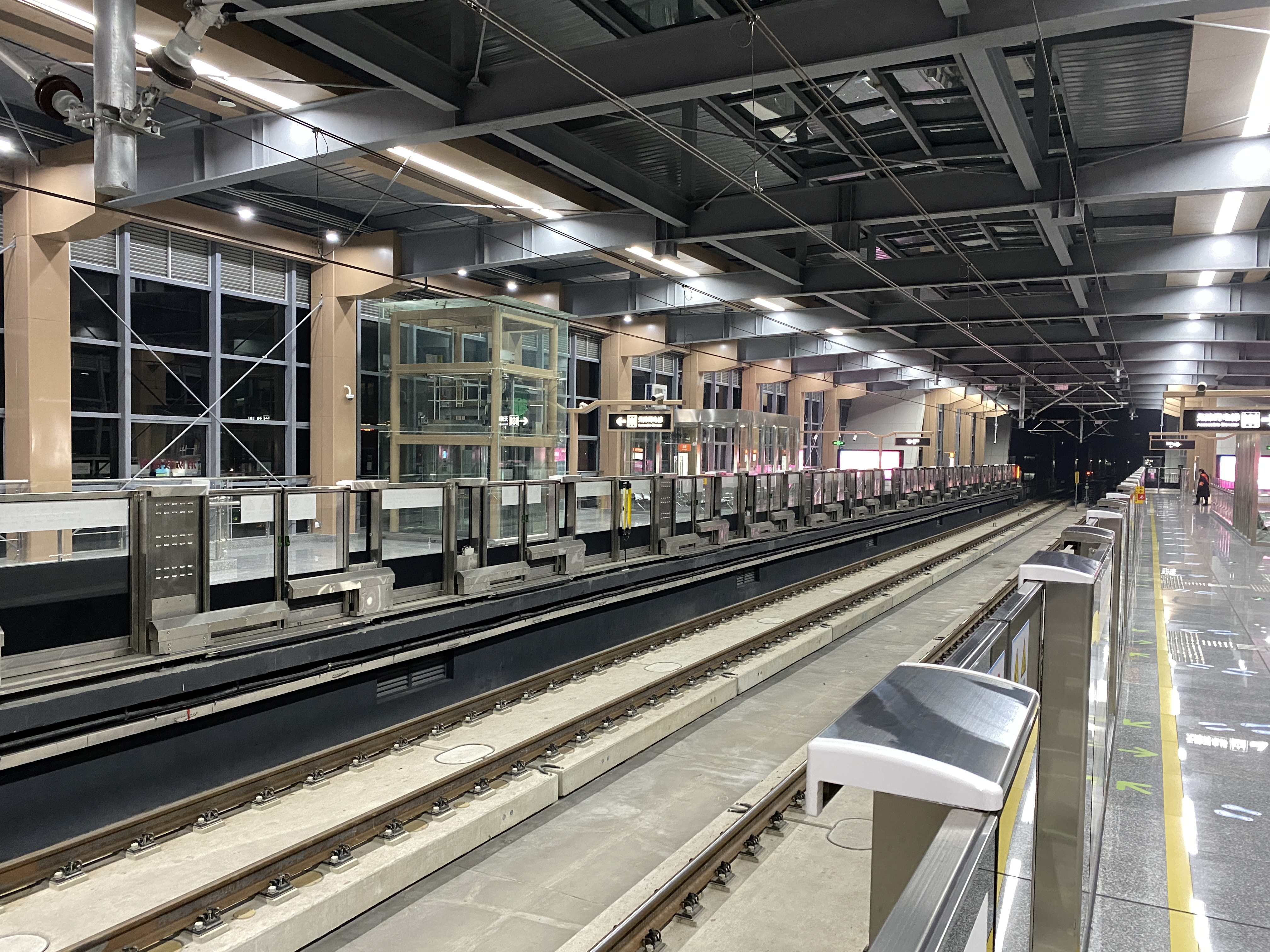 姜山站站台